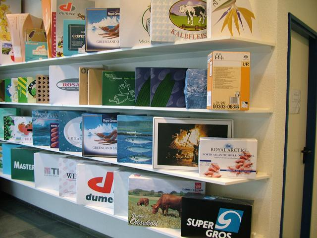 Massiefkartonnen verzendverpakkingen